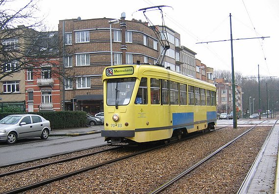 Een tram op de Brusselse tramlijn 83.